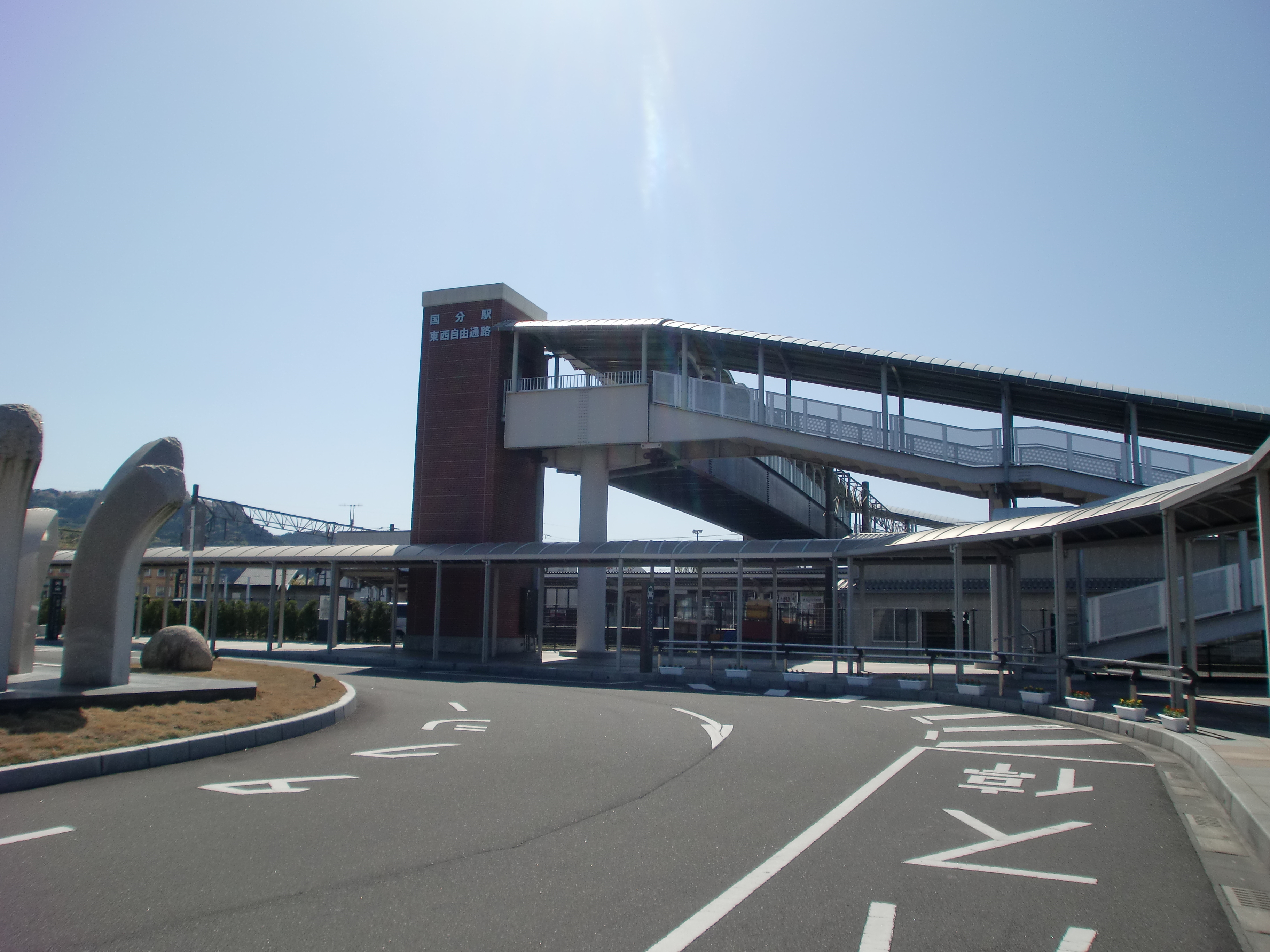 国分駅の西口駅前広場と自由通路。